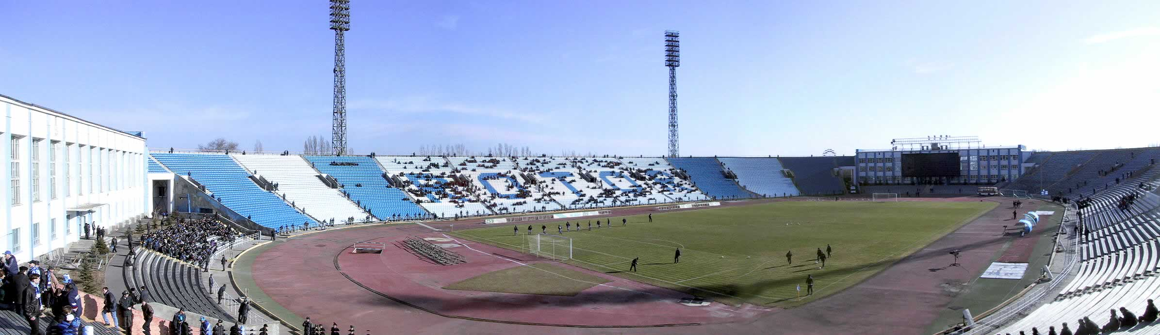 Центральный Стадион